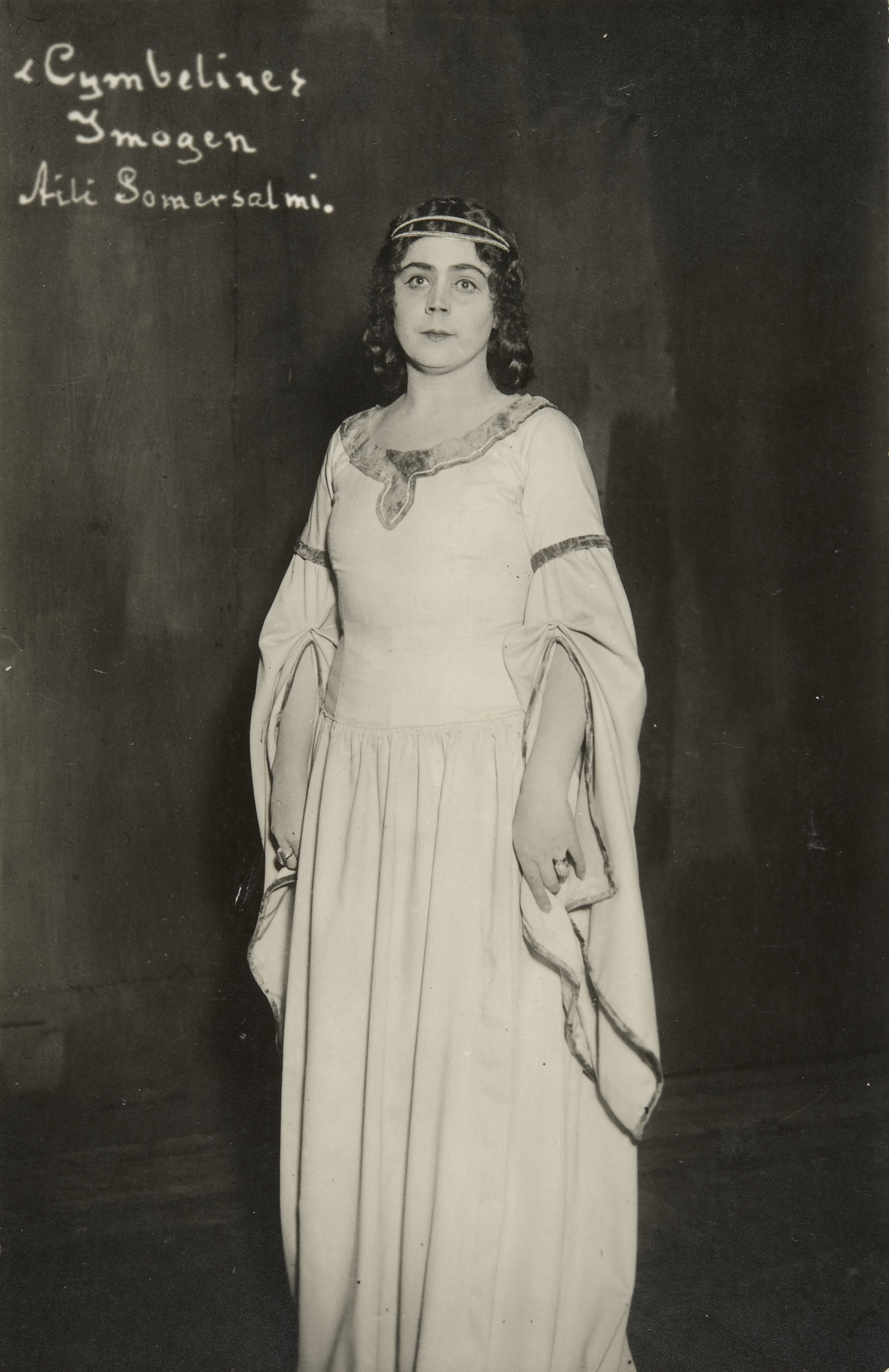 Aili Somersalmi Imogenen roolissa Kansallisteatterin näytelmässä "Cymbeline"; Aili Somersalmi pysty, mustavalkoinen